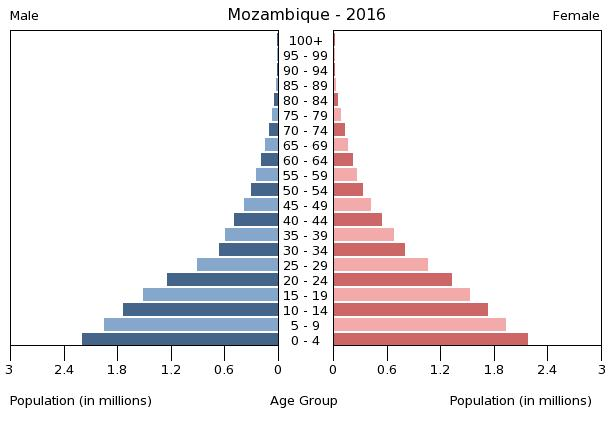 A population pyramid illustrates the age and sex structure of a country's population and may provide insights about political and social stability, as well as economic development. The population is distributed along the horizontal axis, with males shown on the left and females on the right. The male and female populations are broken down into 5-year age groups represented as horizontal bars along the vertical axis, with the youngest age groups at the bottom and the oldest at the top. The shape of the population pyramid gradually evolves over time based on fertility, mortality, and international migration trends.